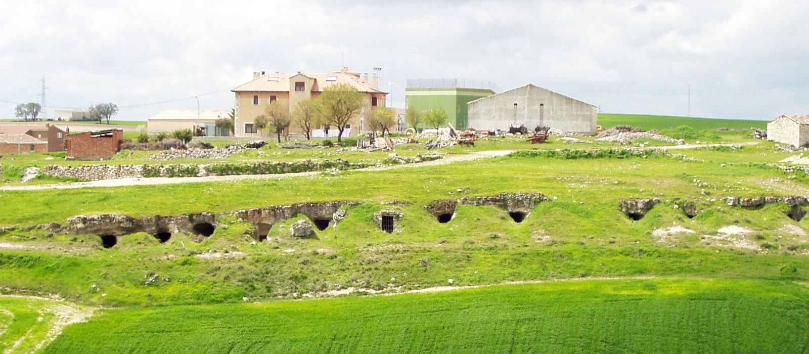 San Llorente. Valladolid. Bodegas. Lanchares. Frontón